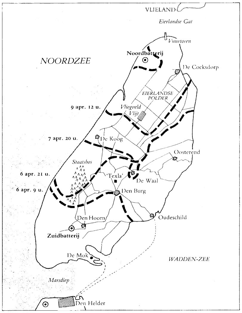 De strijd op Texel. De geblokte lijnen geven ongeveer de zuidelijke grenzen aan van het gebied dat de Georgiërs op de aangegeven dagen en uren in handen hadden. Tot de Noordbatterij konden zij niet doordringen. Het laatste openlijke gevecht werd op 21 april geleverd bij de Vuurtoren op de noordpunt van Texel (de kaart is gebaseerd op de kaarten, voorkomend in J . A. C. Bartels en W. Kalkman: ‘ Texel. Nederlands laatste slagveld').